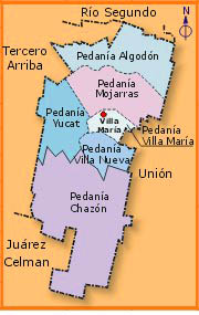 Pedanías